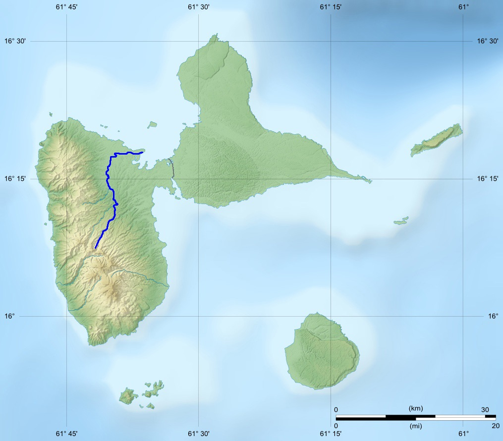 תוואי גראנד ריבייר א גואיאב. מקור: File:Guadeloupe department relief location map.jpg